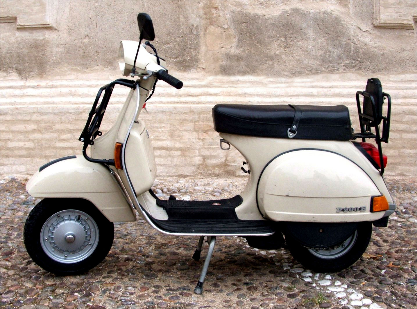 Piaggio Vespa P 200 E del 1982 fotografata al Raduno Moto Storiche di Medole nel 2007